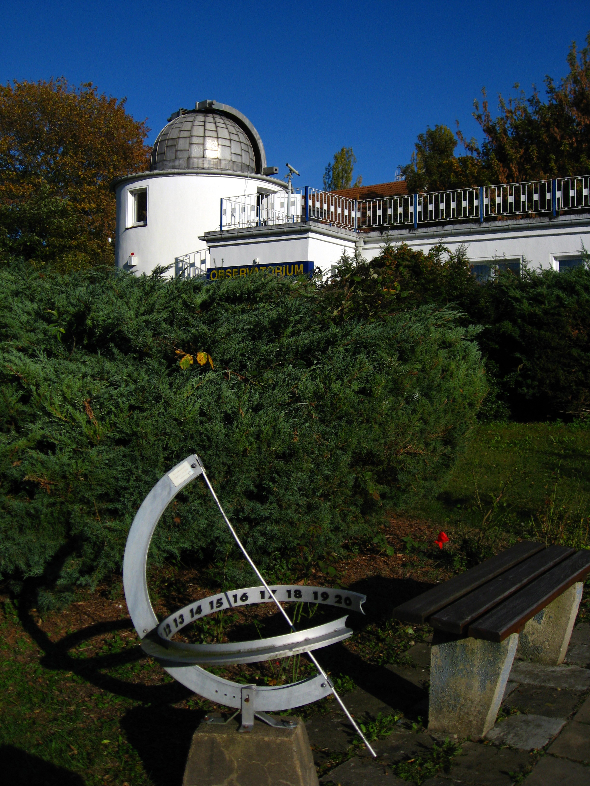 Sonnenuhr und geöffnete Teleskopkuppel des Observatorium im Astronomischen Zentrums Schkeuditz